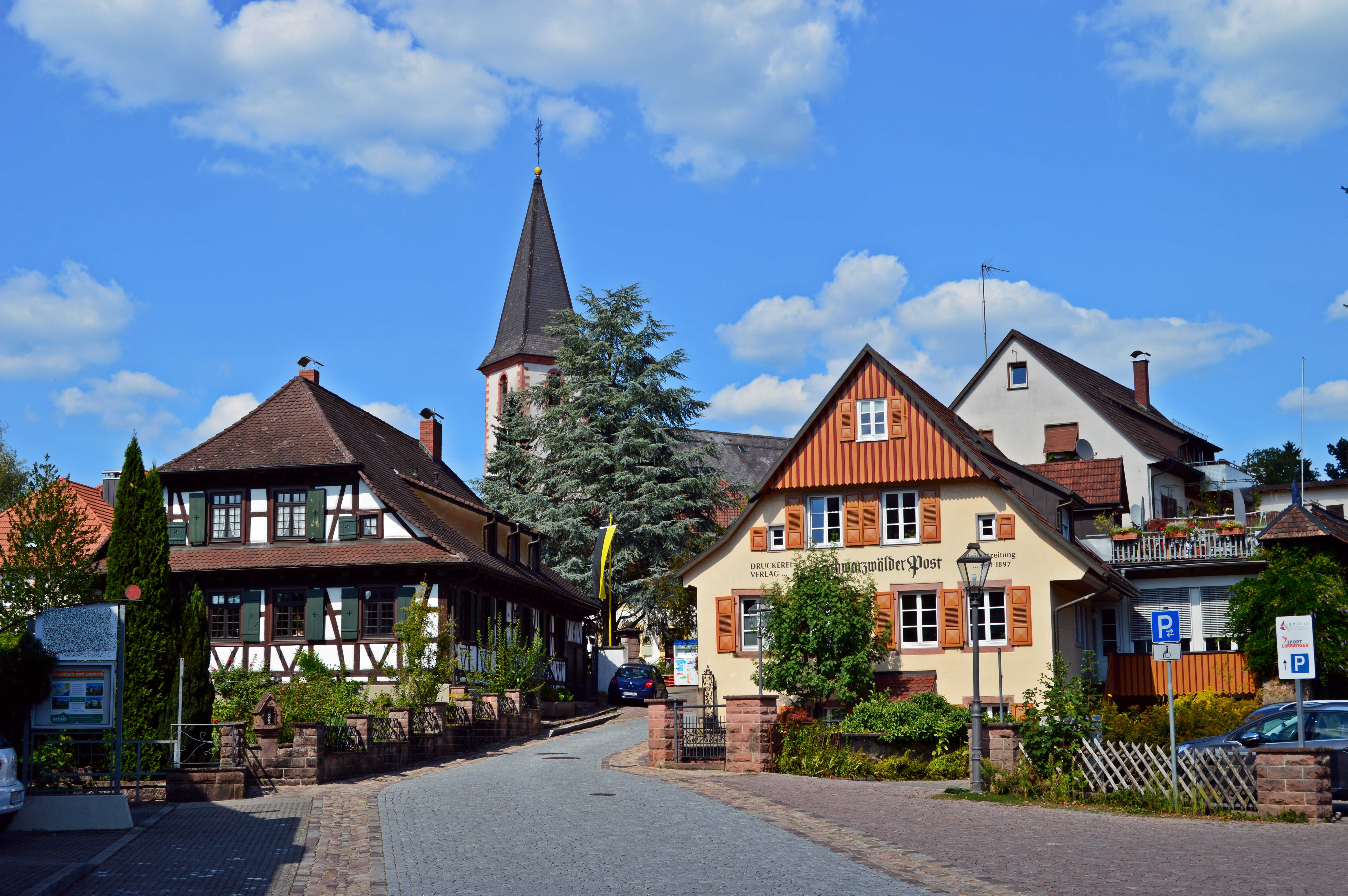 Pfarrhofgraben mit Stadtkirche und Verlagshaus der Heimatzeitung